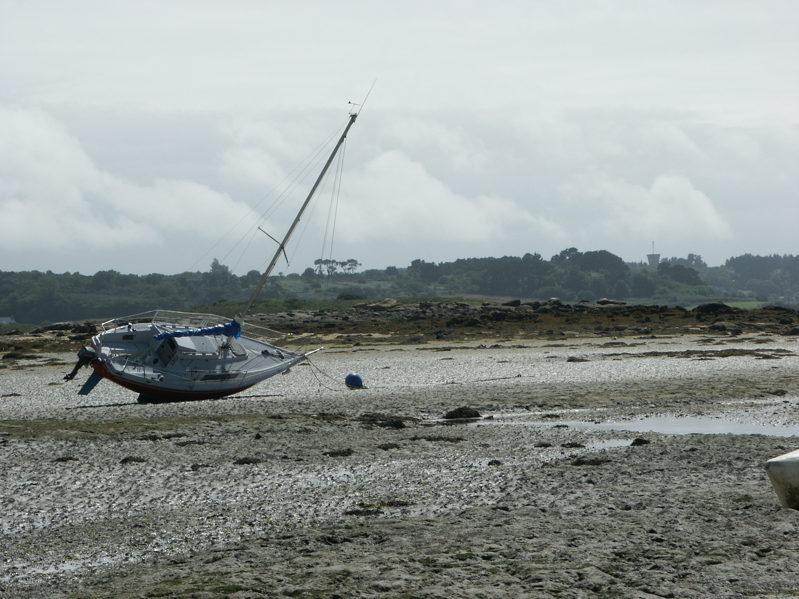 Estran à Landrellec, Côtes d'Armor, France Author: Fanny Schertzer